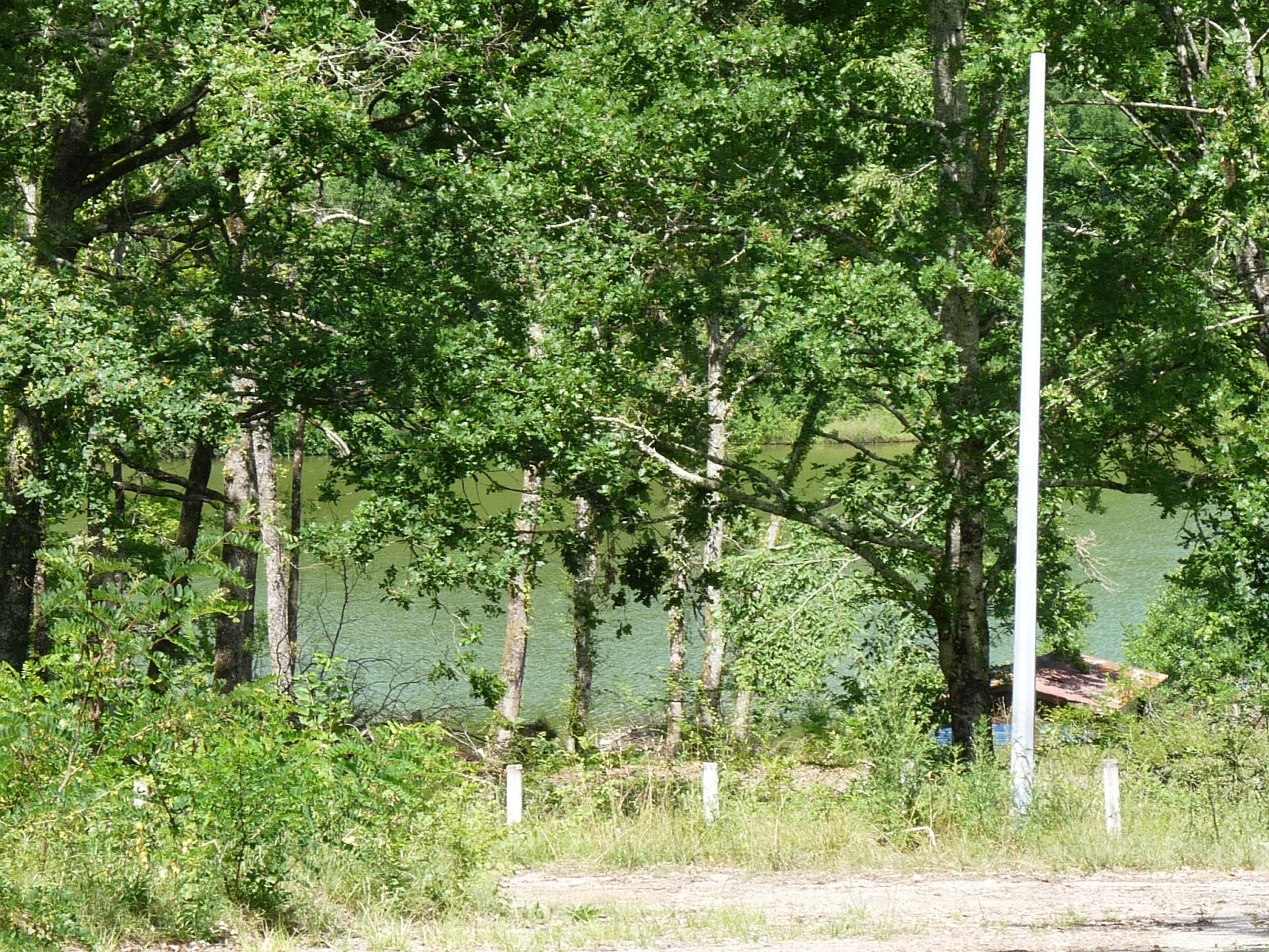 Lac de Castelgaillard, Saint-Sernin, Lot-et-Garonne, France